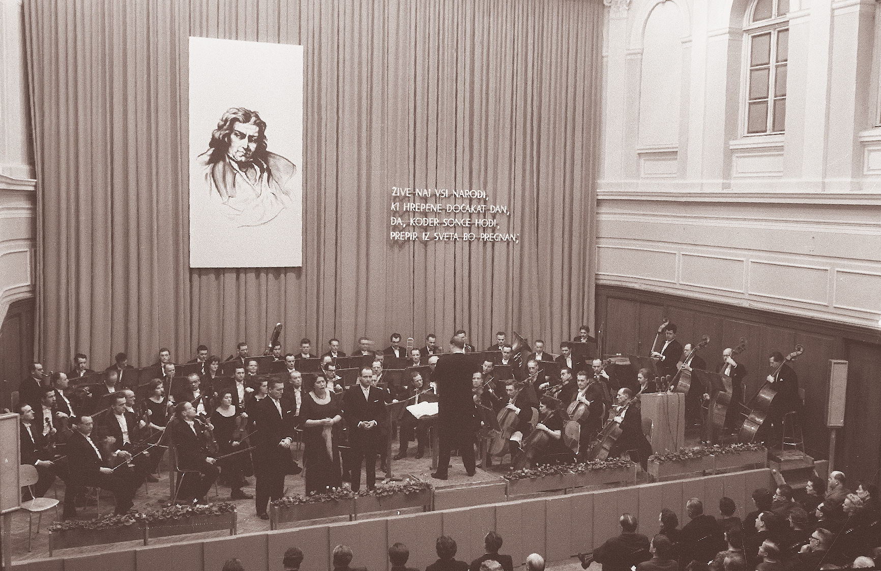 Podelitev Prešernovih nagrad. Koncert Simfoničnega orkestra Slovenske filharmonije.